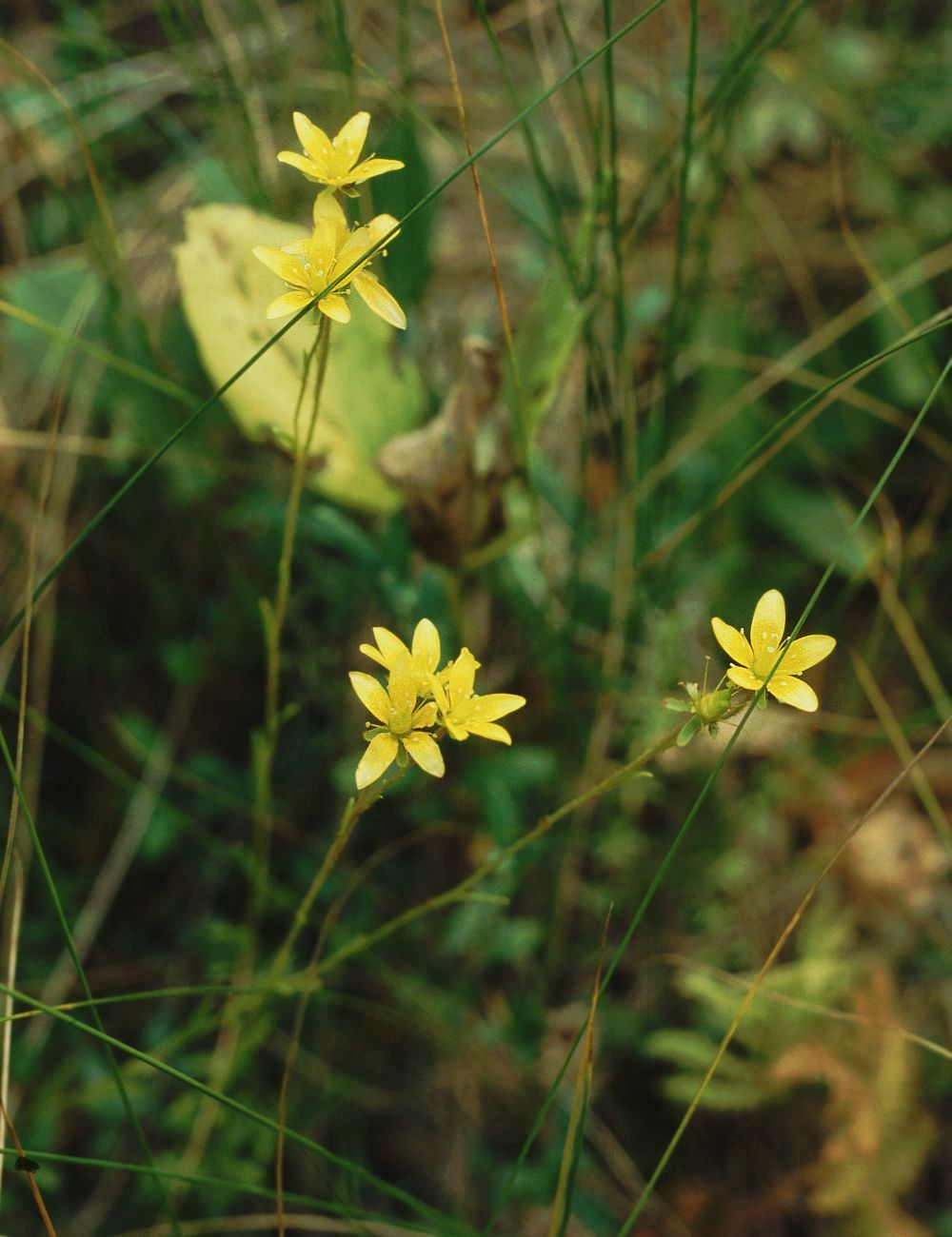 Moor-Steinbrech (Saxifraga hirculus subsp. hirculus), Steinbrechgewächse (Saxifragaceae) – Lettland/Latvija/Latvia: Vidzeme, Vesetnieke NE Pļaviņas